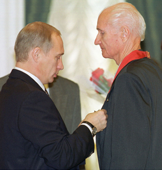 МОСКВА, КРЕМЛЬ. Церемония вручения государственных наград. Награждается академик РАН Владимир Евсеевич Зуев